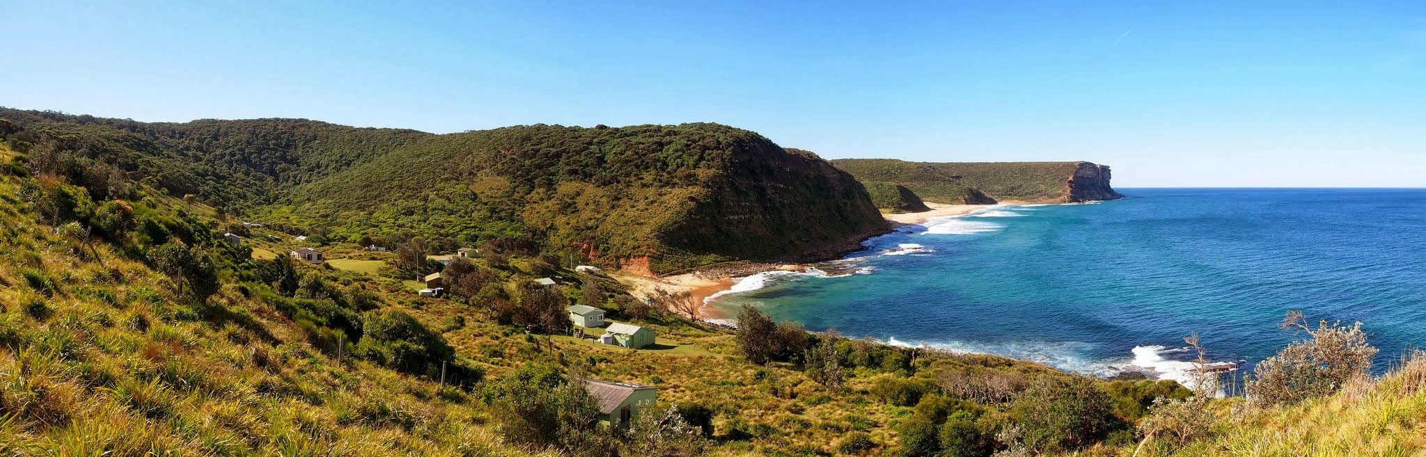 Little Garie